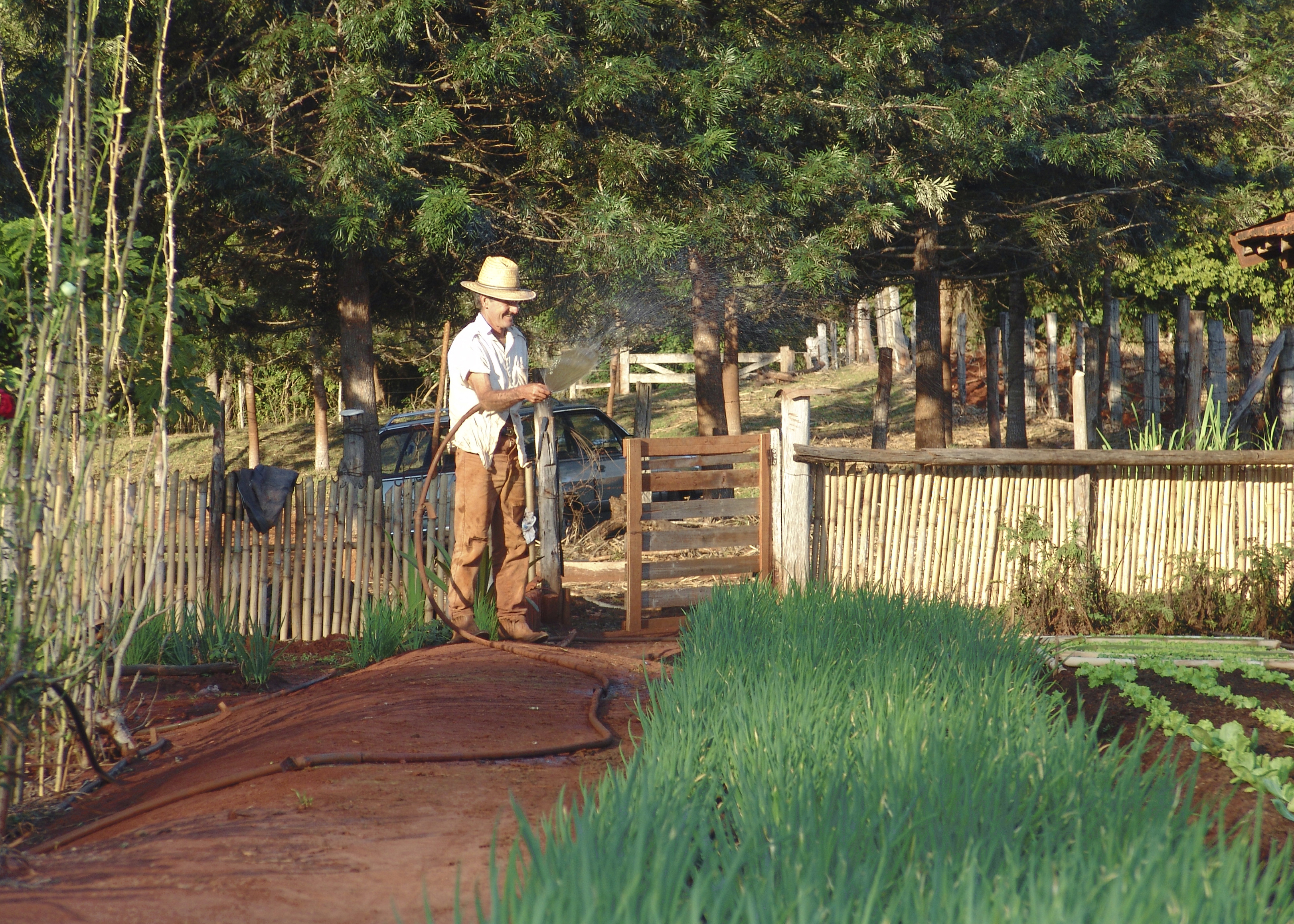 Irrigação manual de horta em pequena propriedade rural - Avaré, São Paulo, Brasil